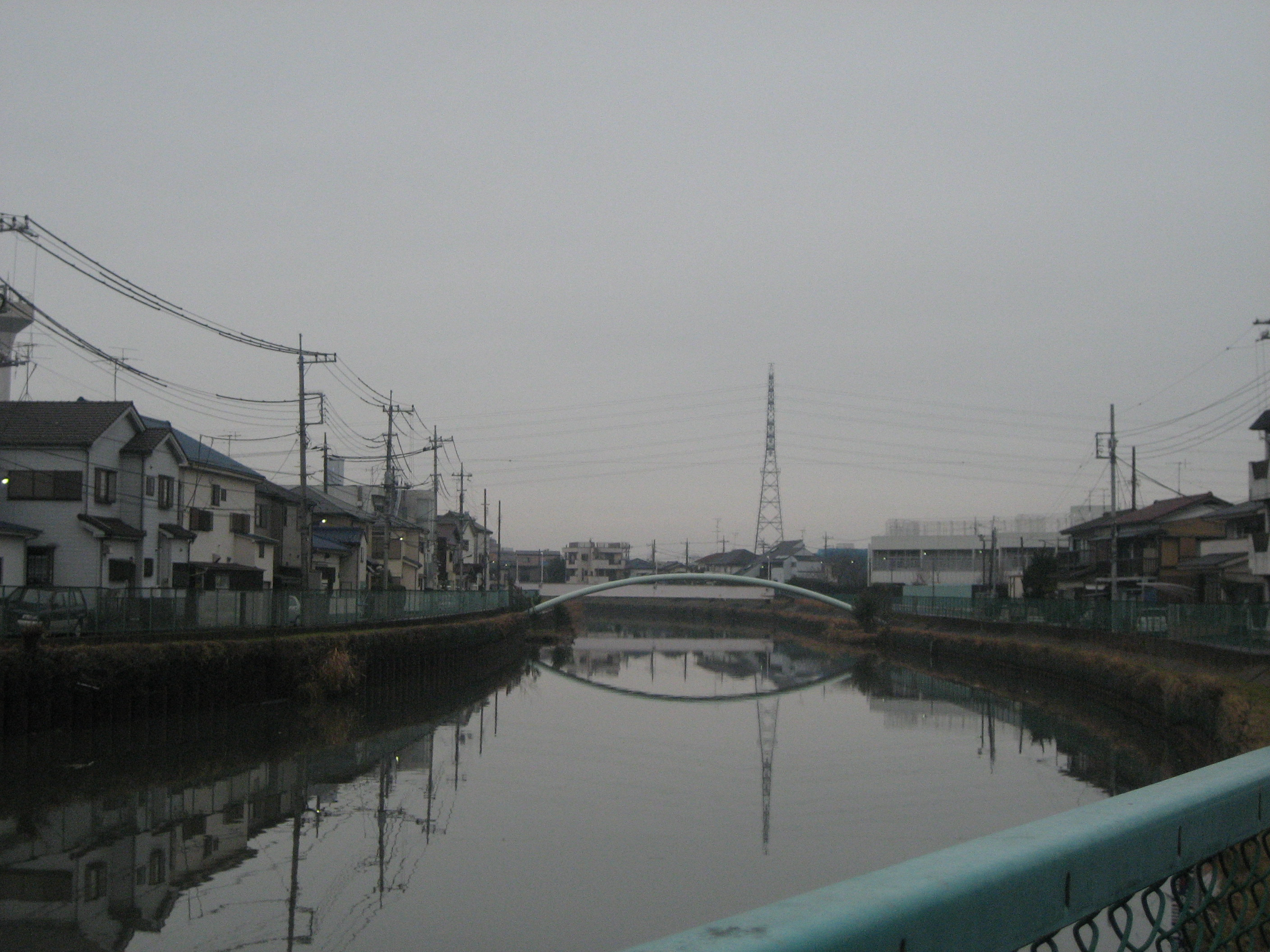 毛長川（足立区内）